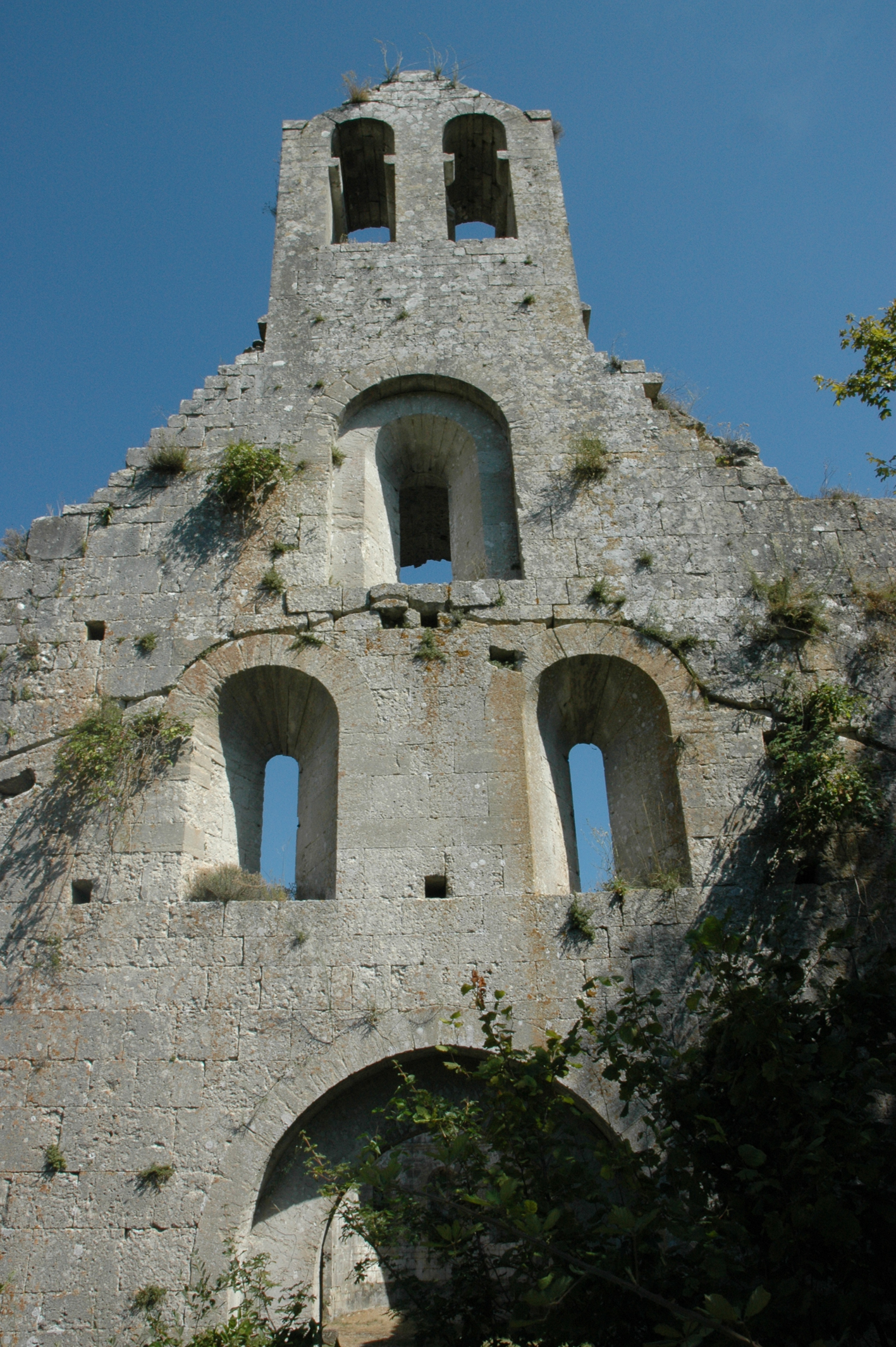 Notre-Dame-de-la-Brune. XIIe siècle. Fontaine miraculeuse .